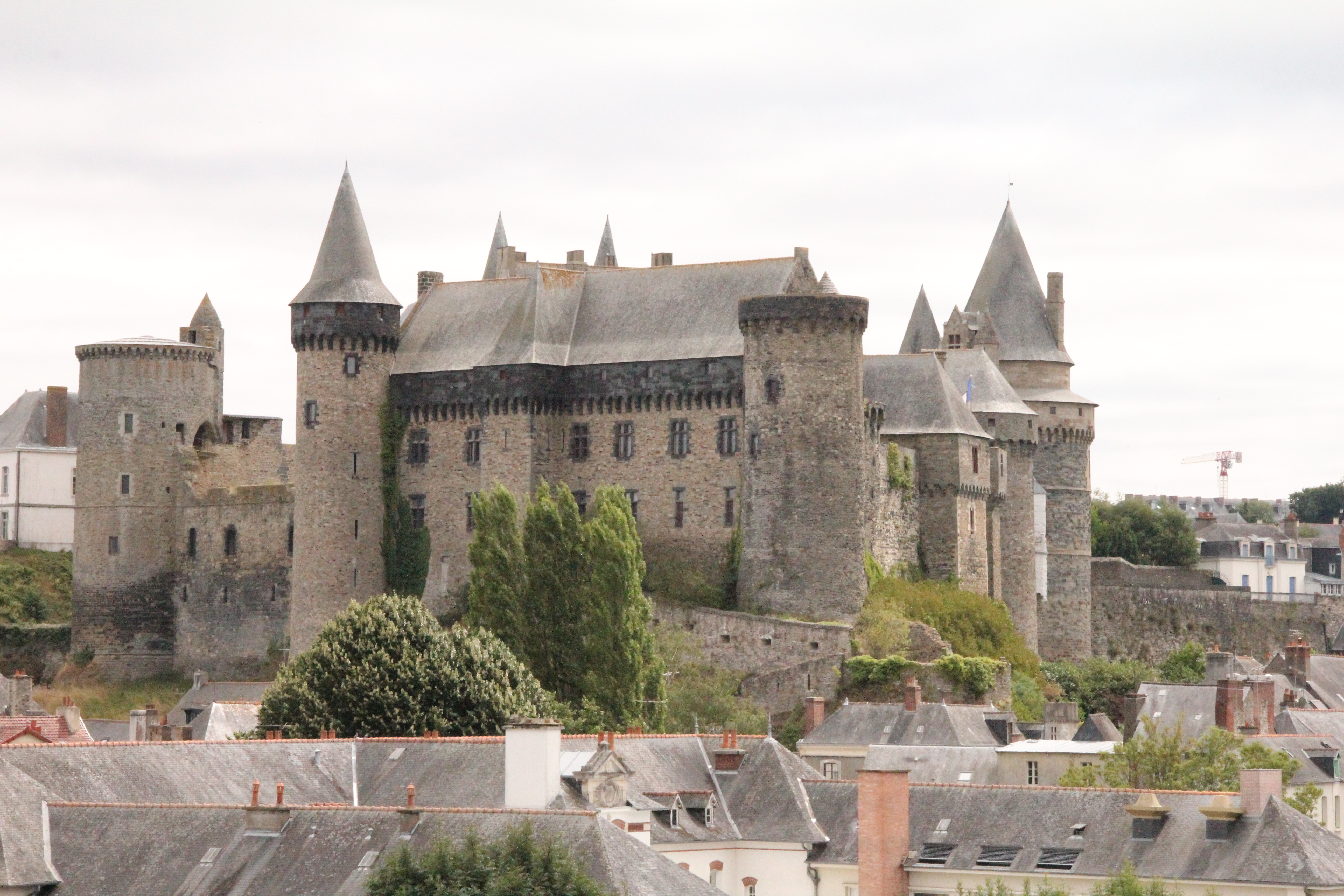 Vue sur le château en arrivant à Vitré